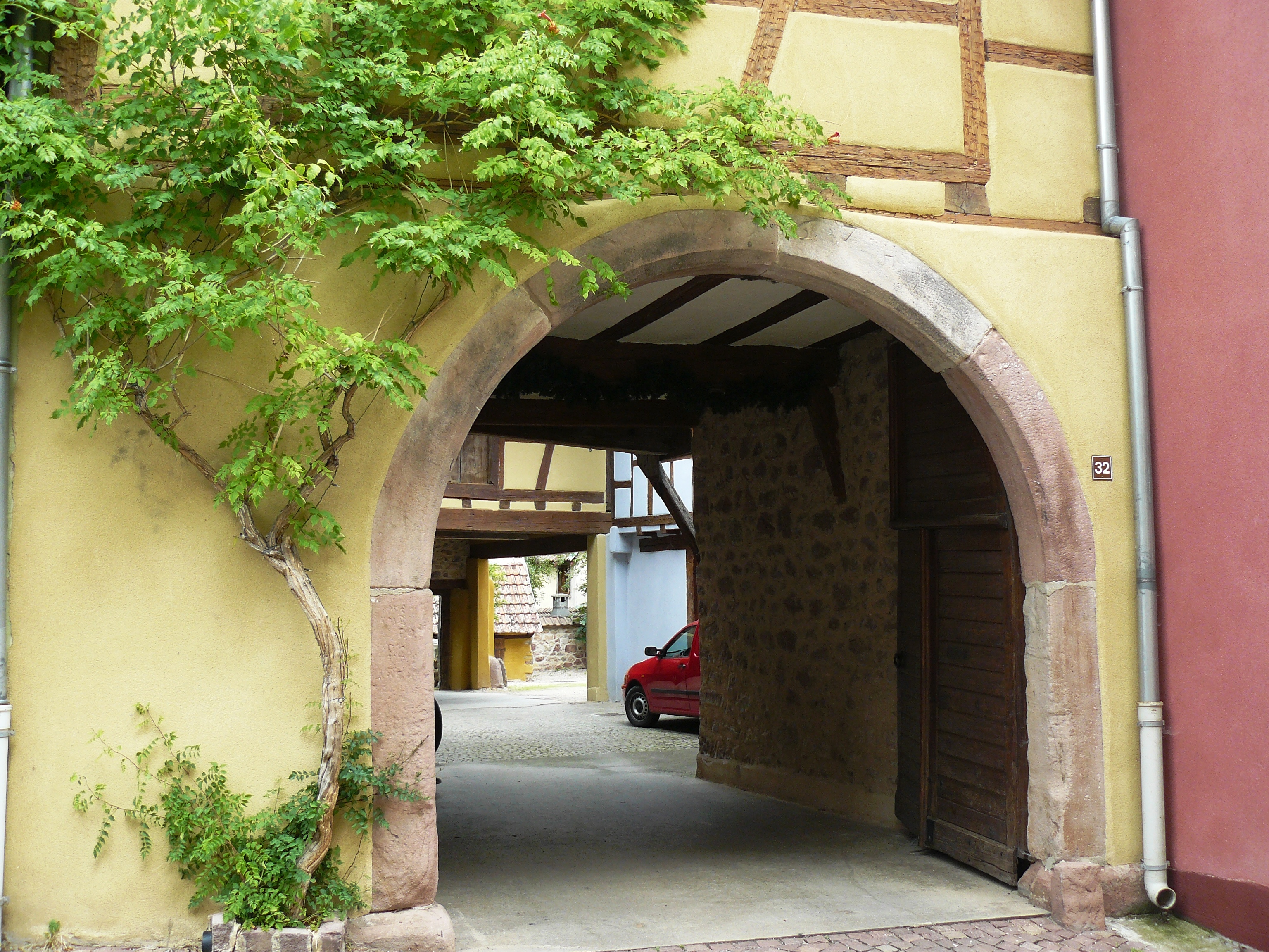 Portique d'une ancienne cave vinicole